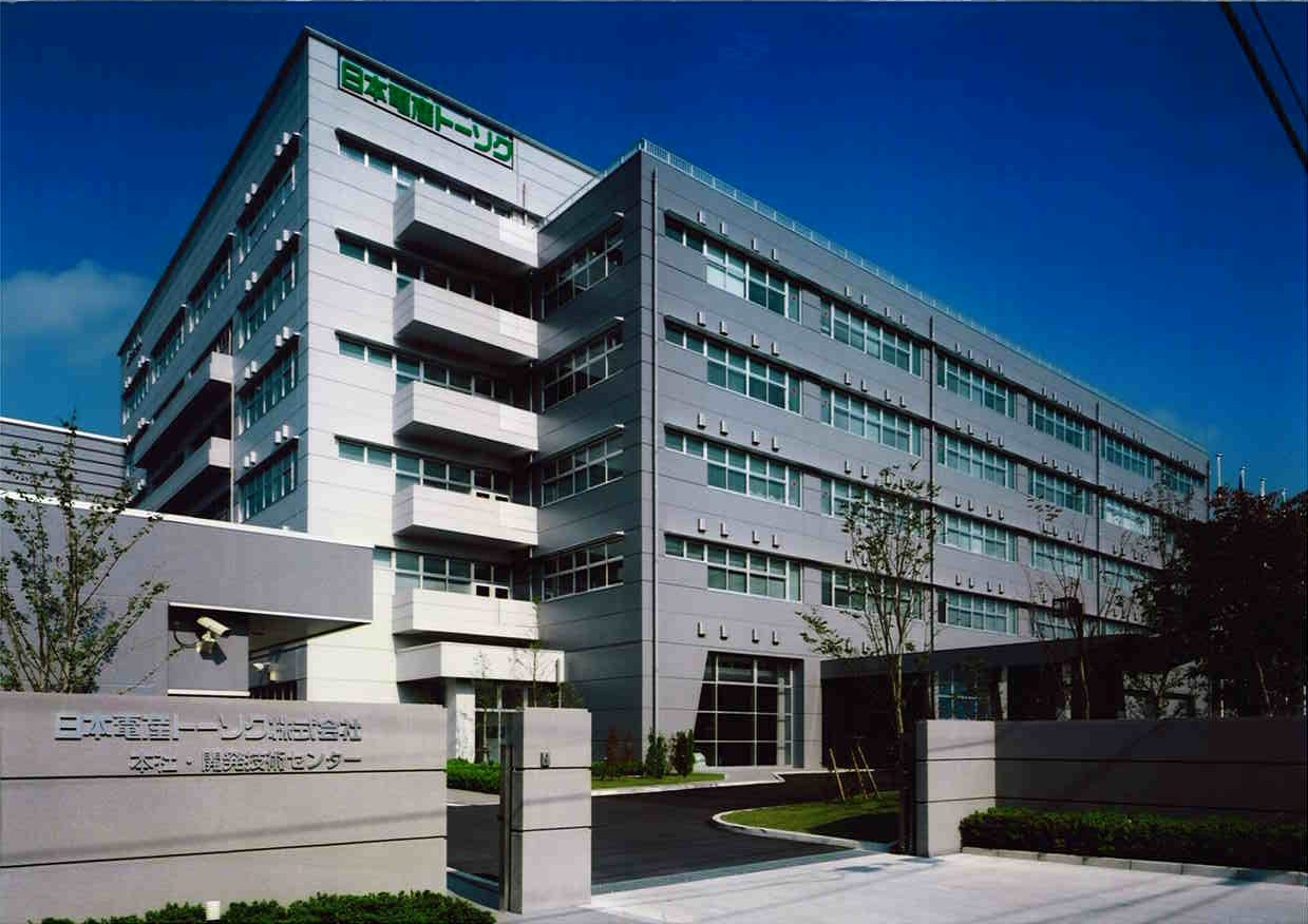 tosok